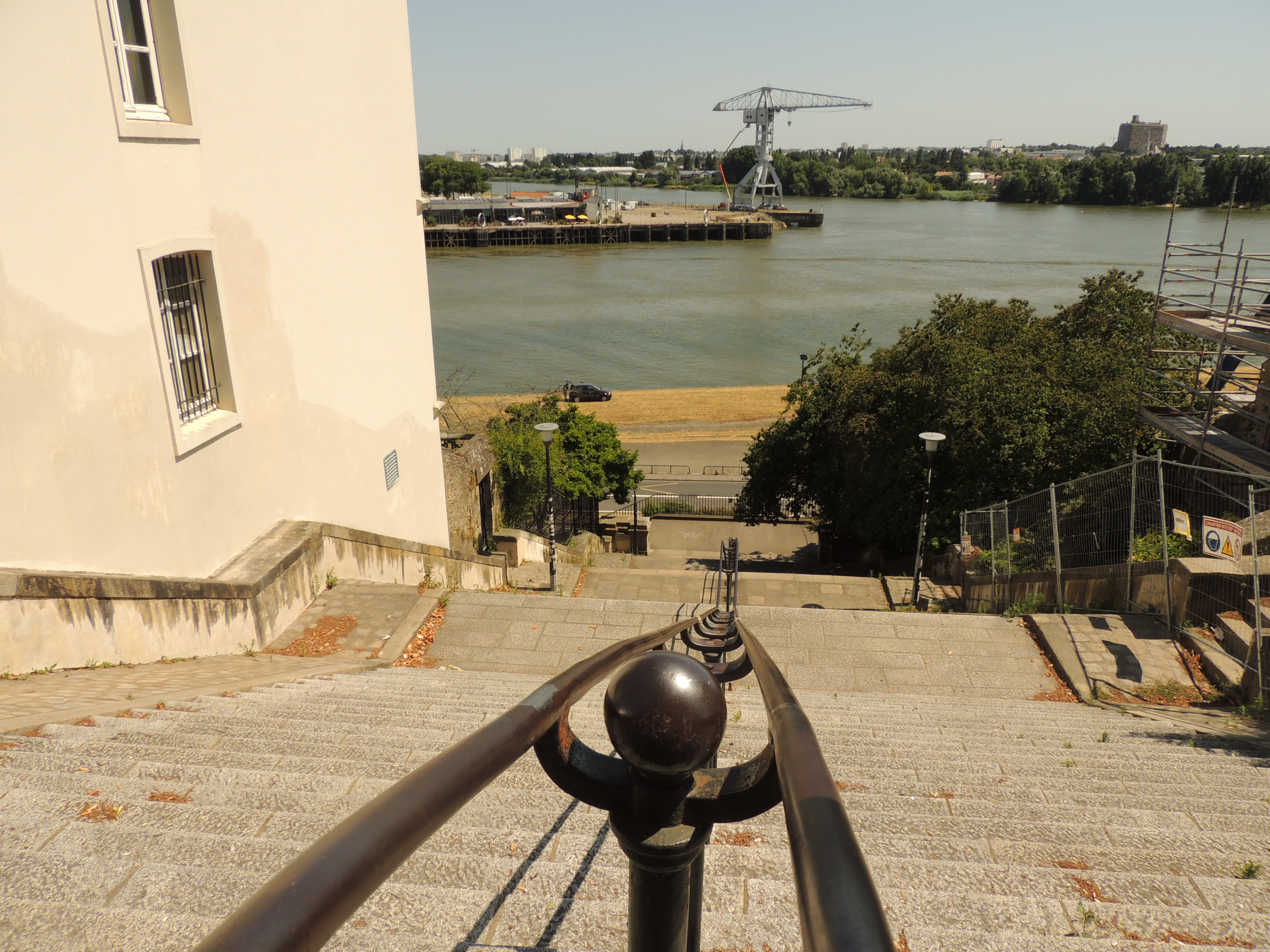 Escalier Sainte-Anne à Nantes, en France, vu du pied de la statue Sainte-Anne